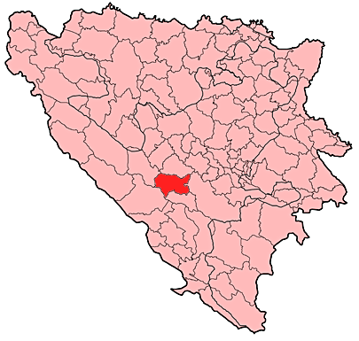 Prikaz općine Prozor u Bosni i Hercegovini